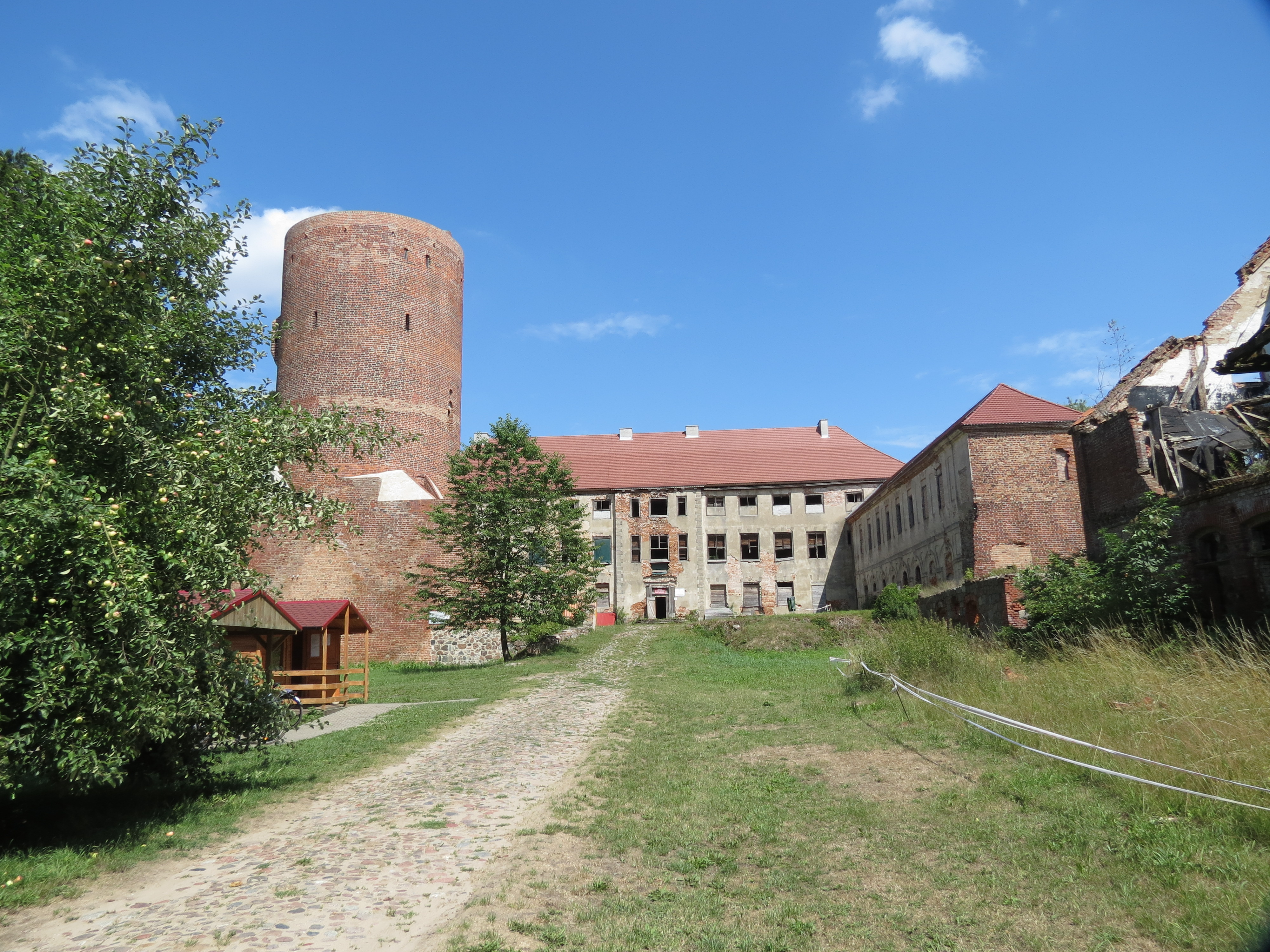 Schloss Wildenbruch/Zamek Swobnica, Gmina Banie